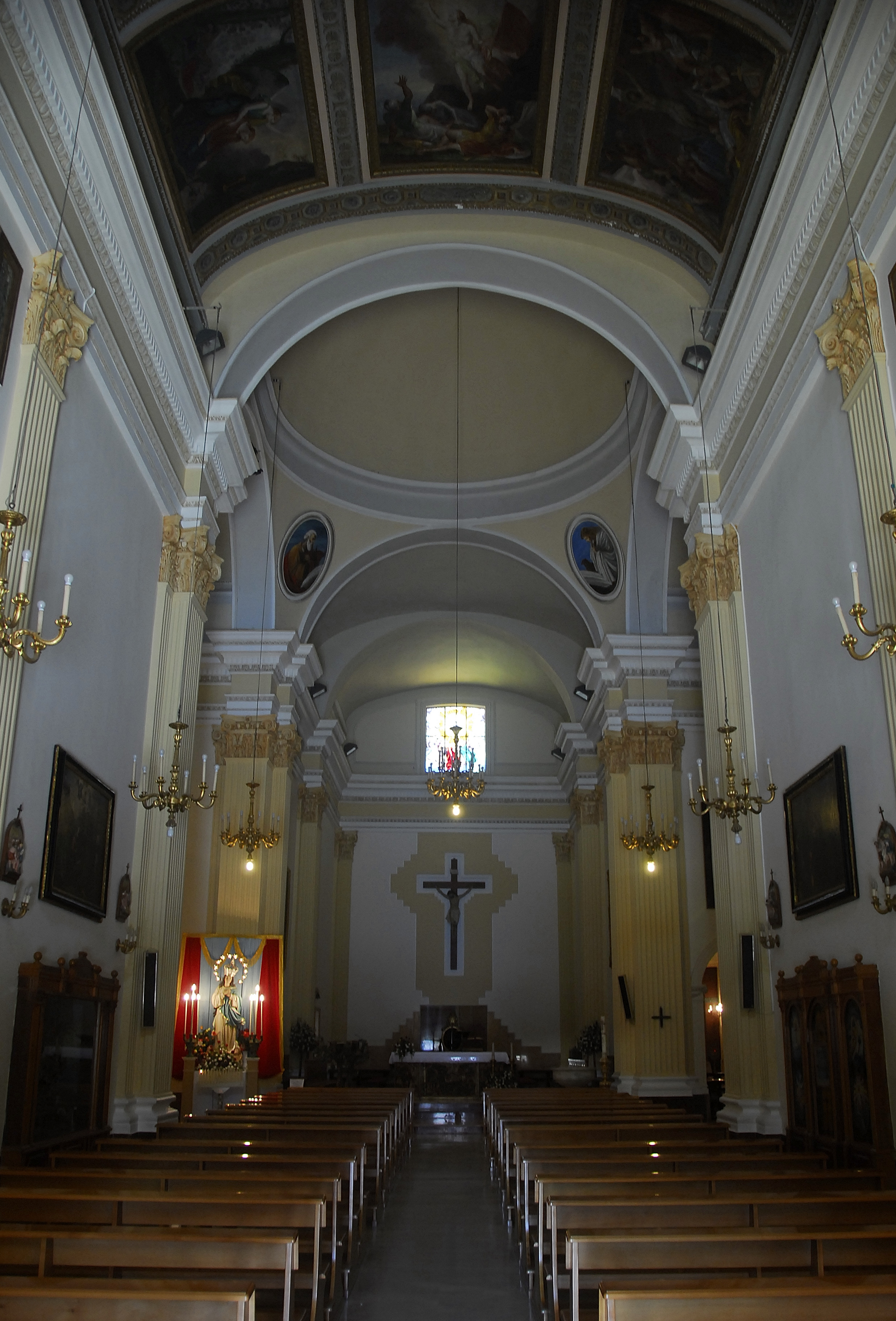 Palermo, ITA